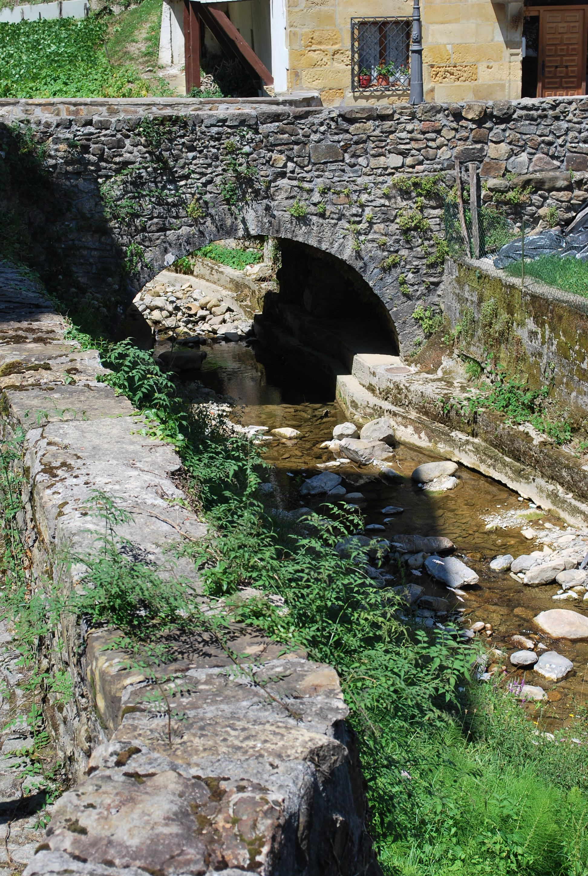 Pont menant au musée Simon Bolivar à Ziortza-Bolibar (Biscaye).